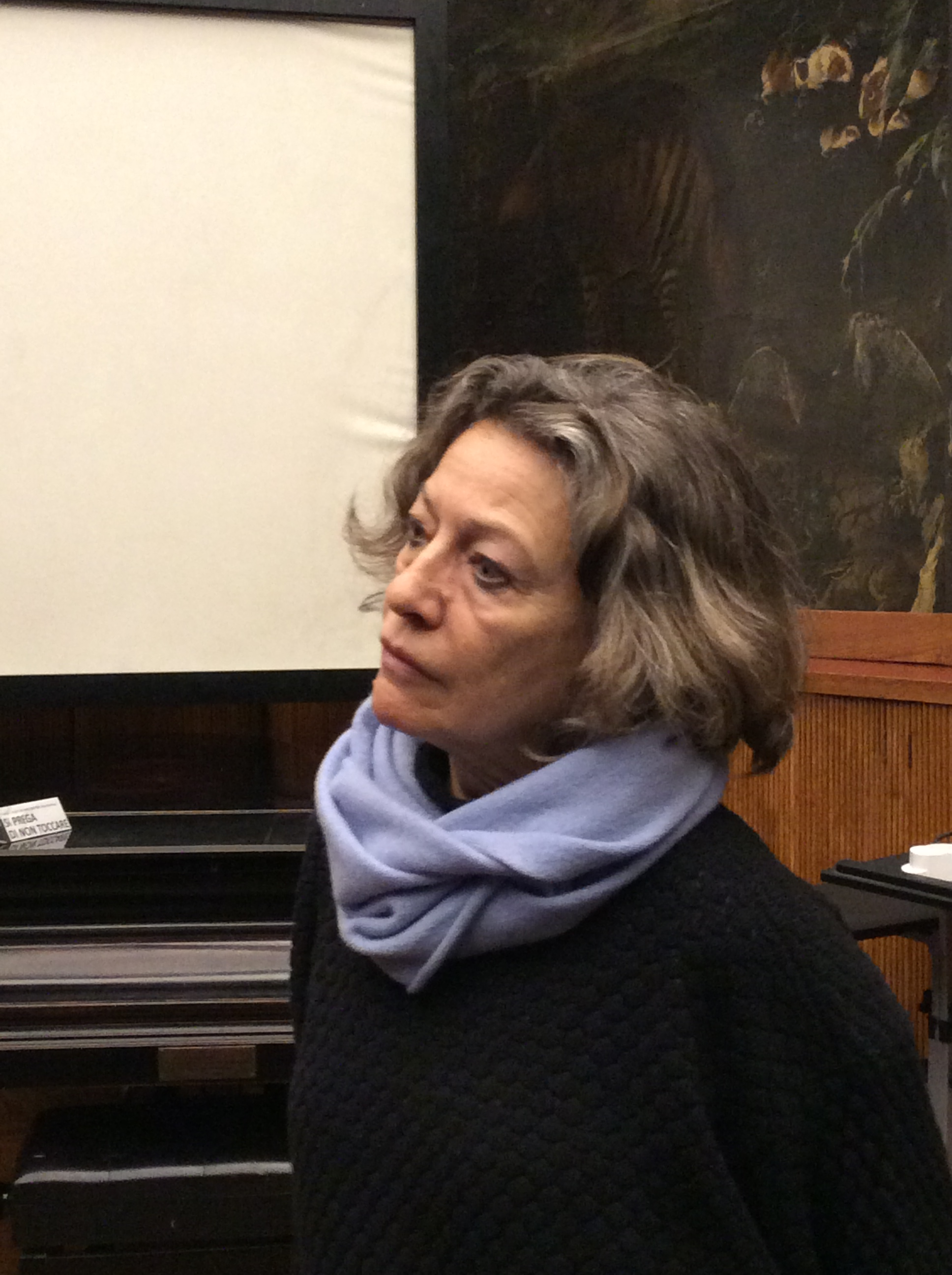 Concetta D'Angeli